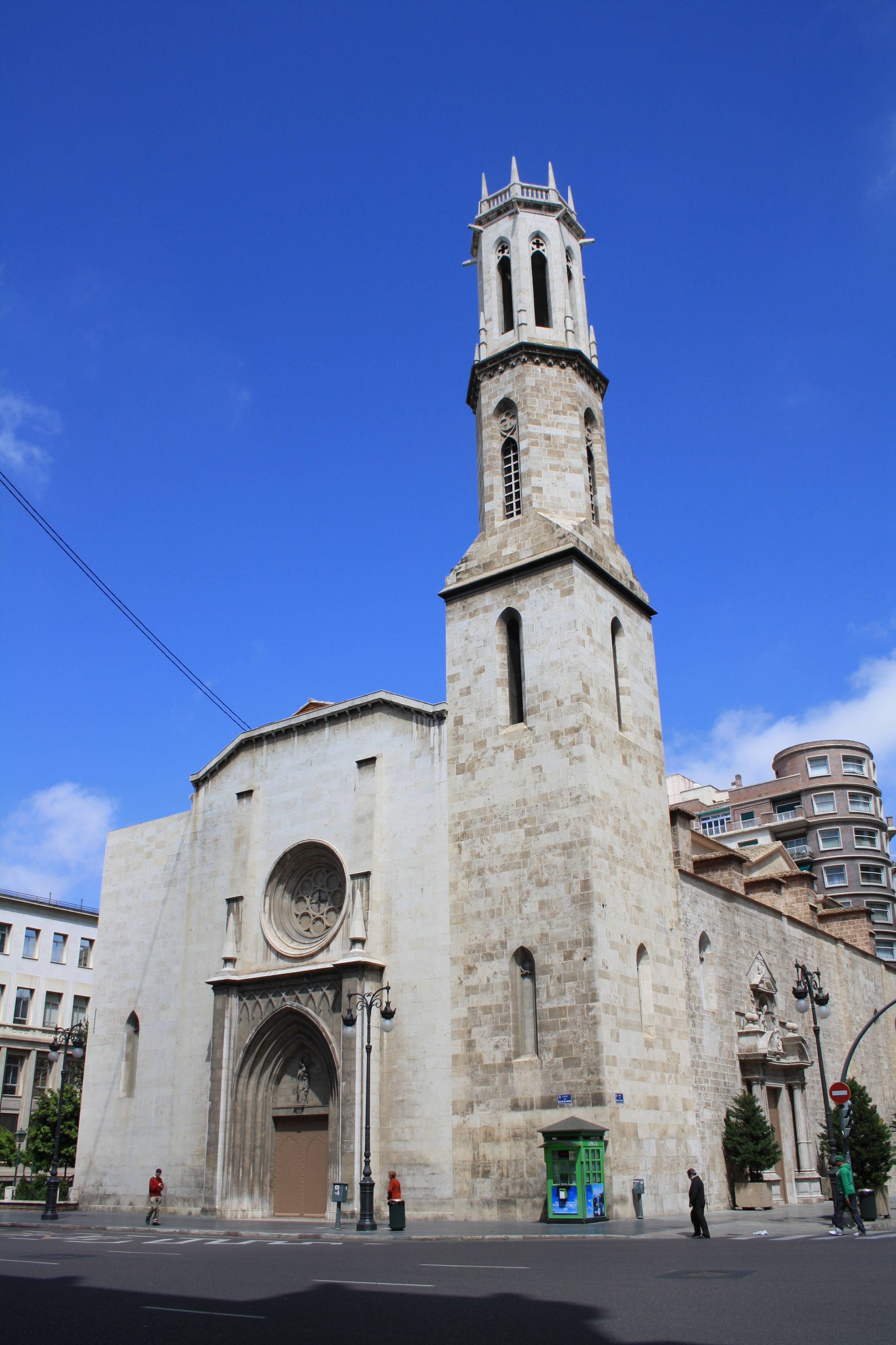 Iglesia San Agustin.